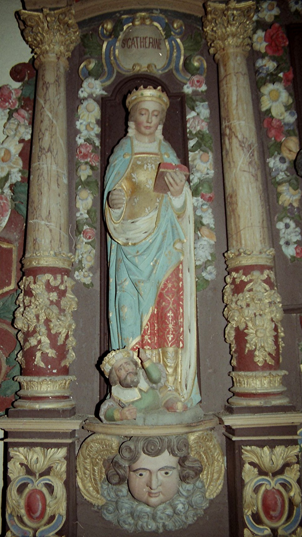 Église Cloître Pleyben, denez goasguen.